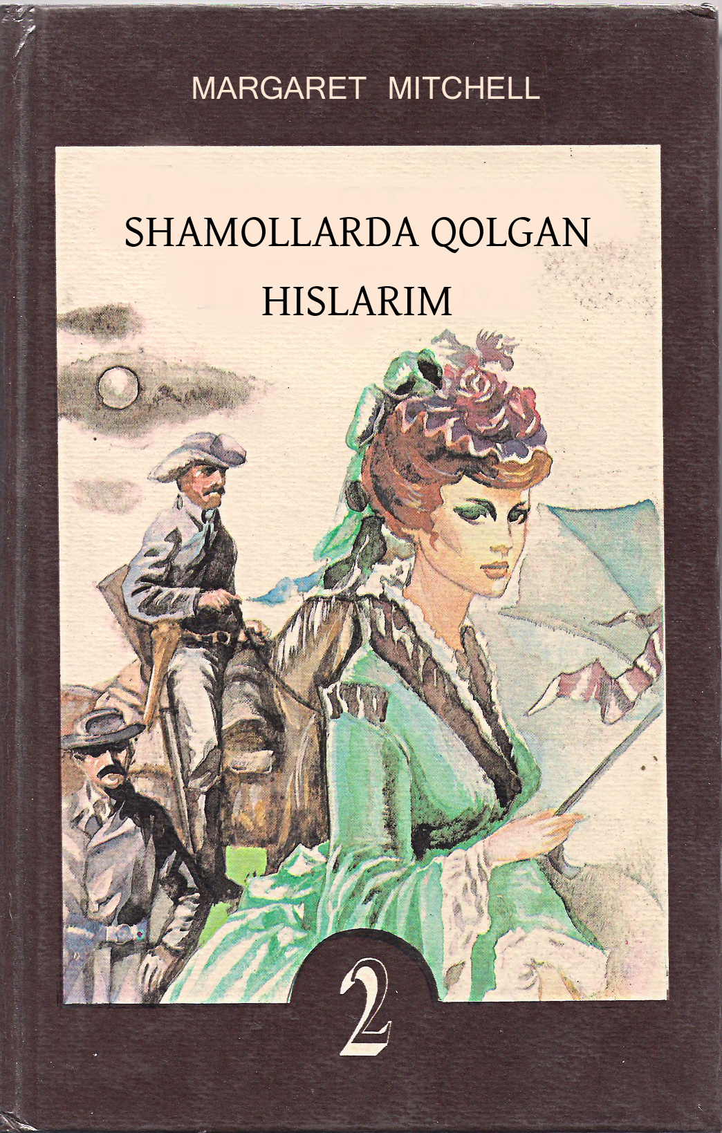 Oʻzbekcha/ўзбекча: Shamollarda qolgan hislarim 2 kitobining muqovasi